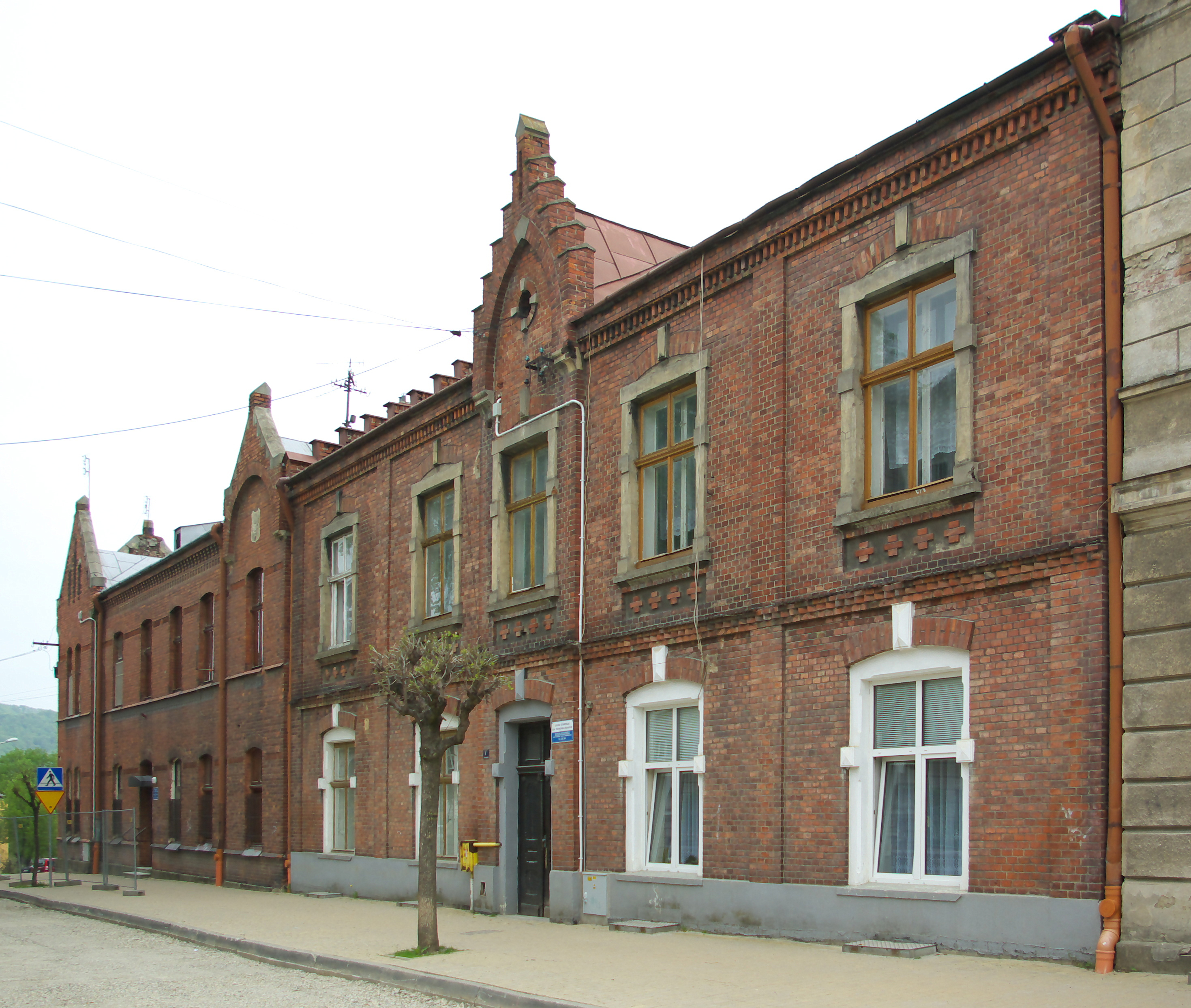 Kamienice przy ul. Jana III Sobieskiego 8 i 10 w Sanoku